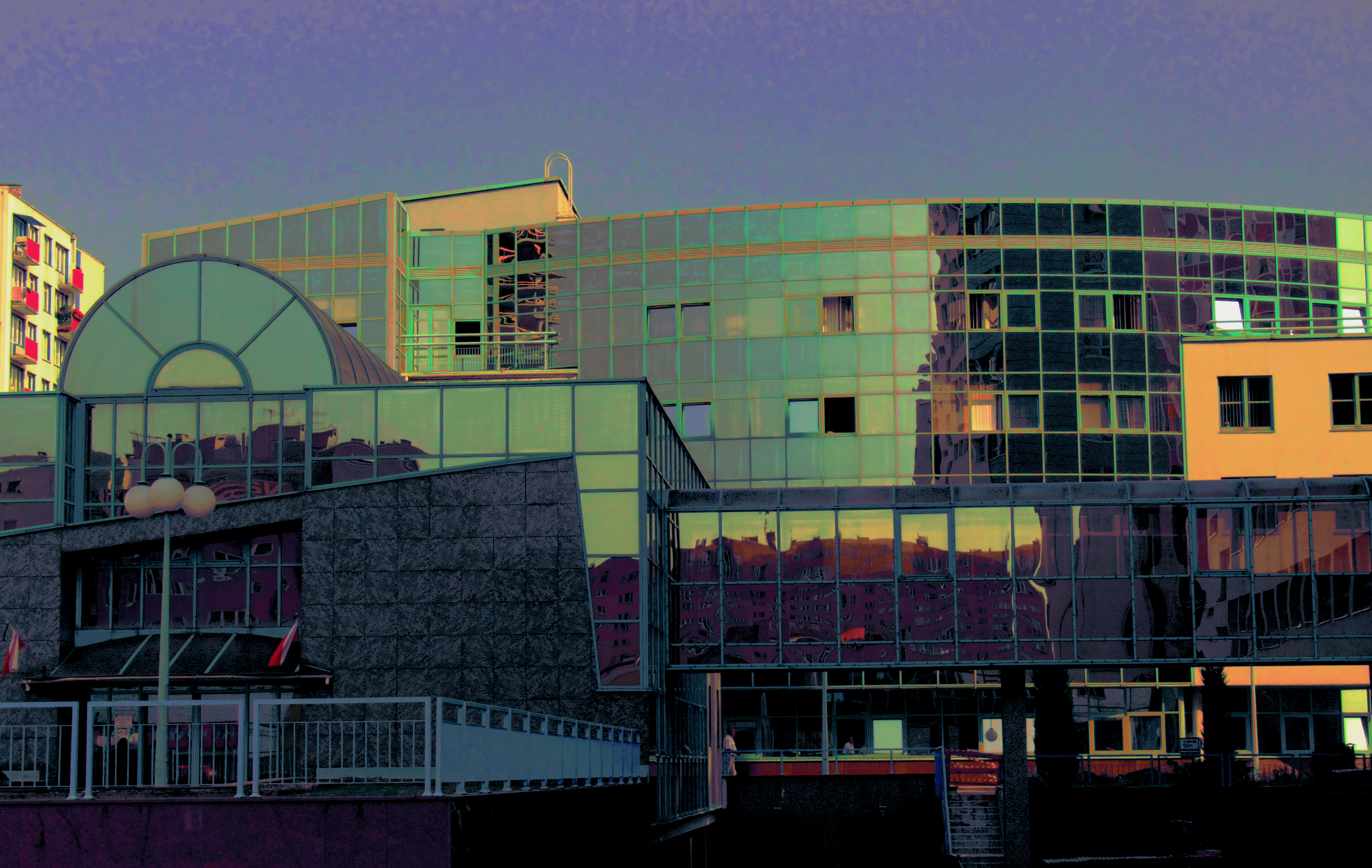 budynek Oddziału ZUS w Lublinie